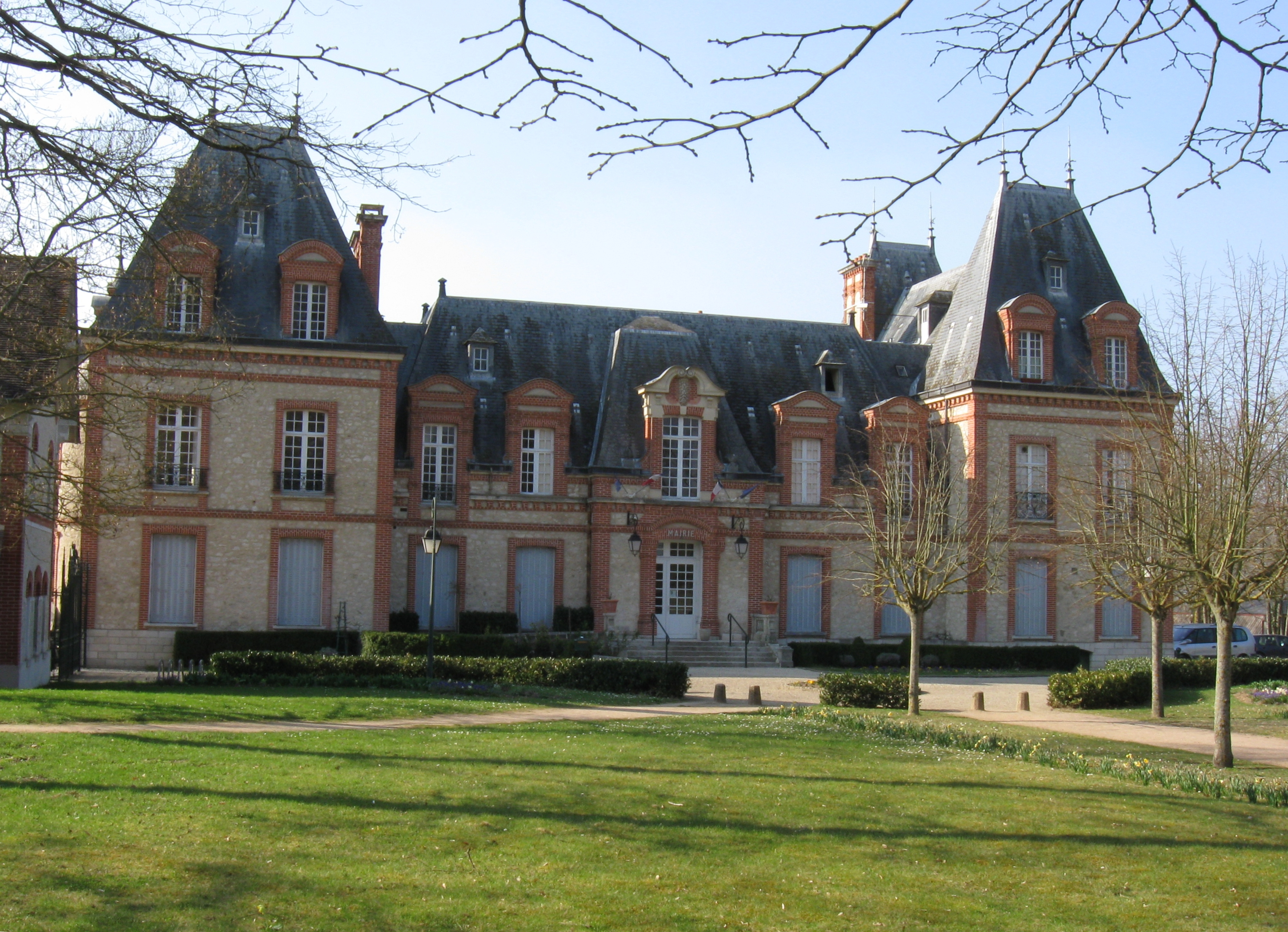 Château de Montcourt-Fromonville (Seine-et-Marne, région Île-de-France)